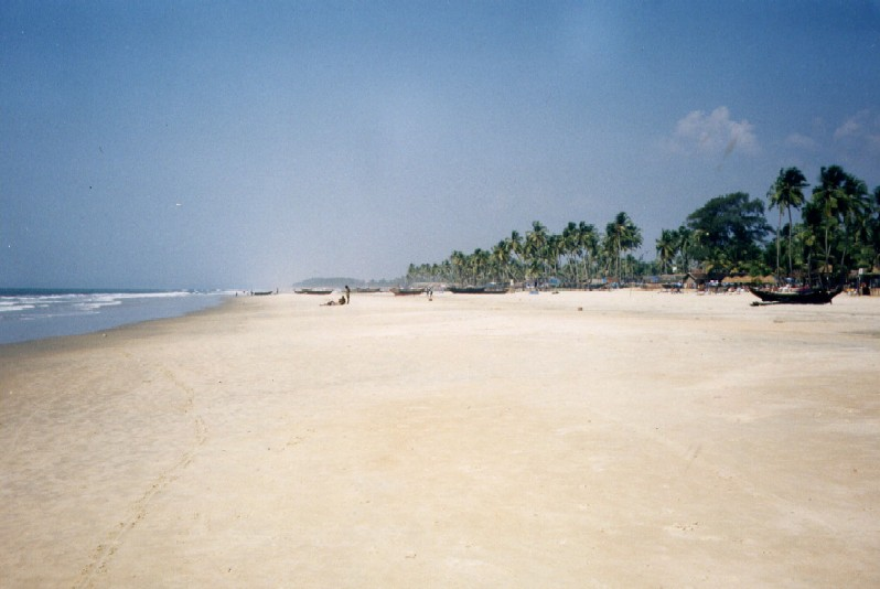 Pláž na jihu Goi (Cavelossim Beach, Salcete, Goa)